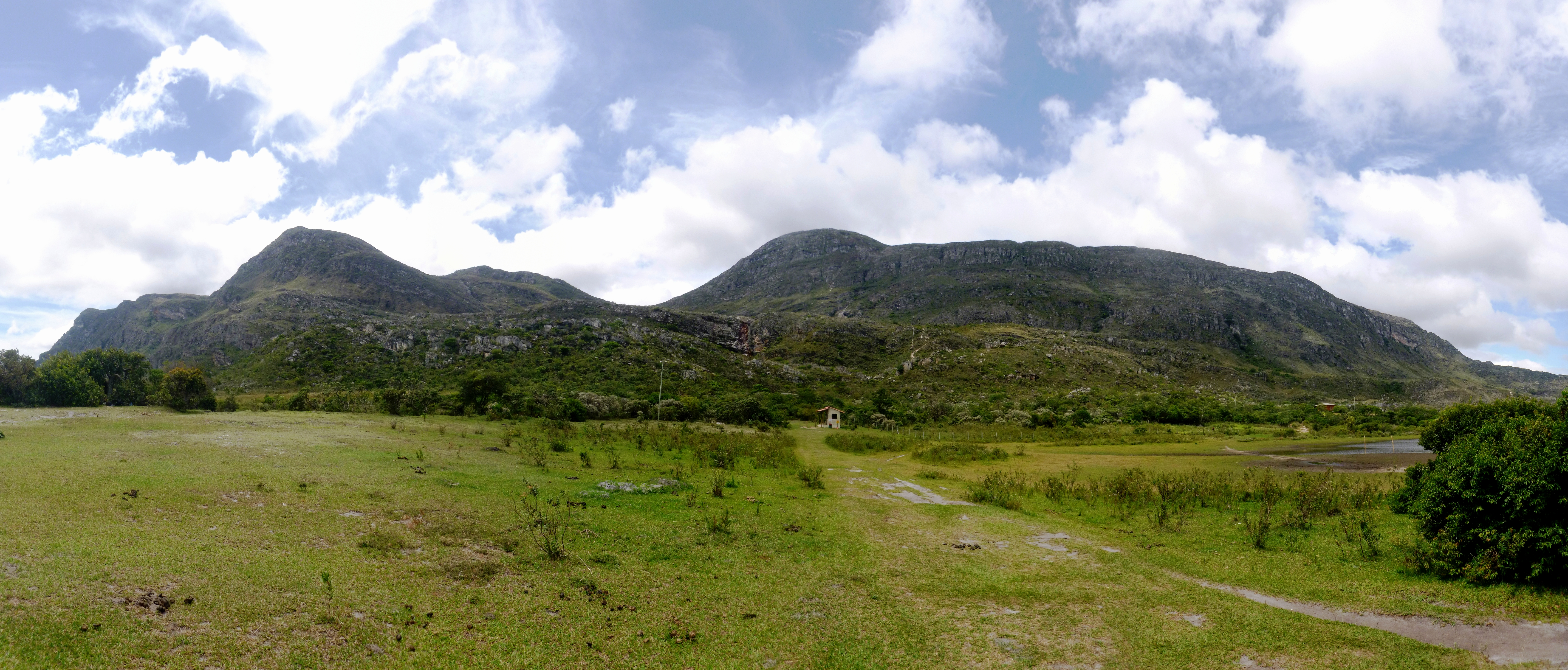 Serra do Espinhaço vista da Lapinha da Serra, O dois pontos mais altos da esquerda para a direita são o Pico da Lapinha e o Pico do Breu.